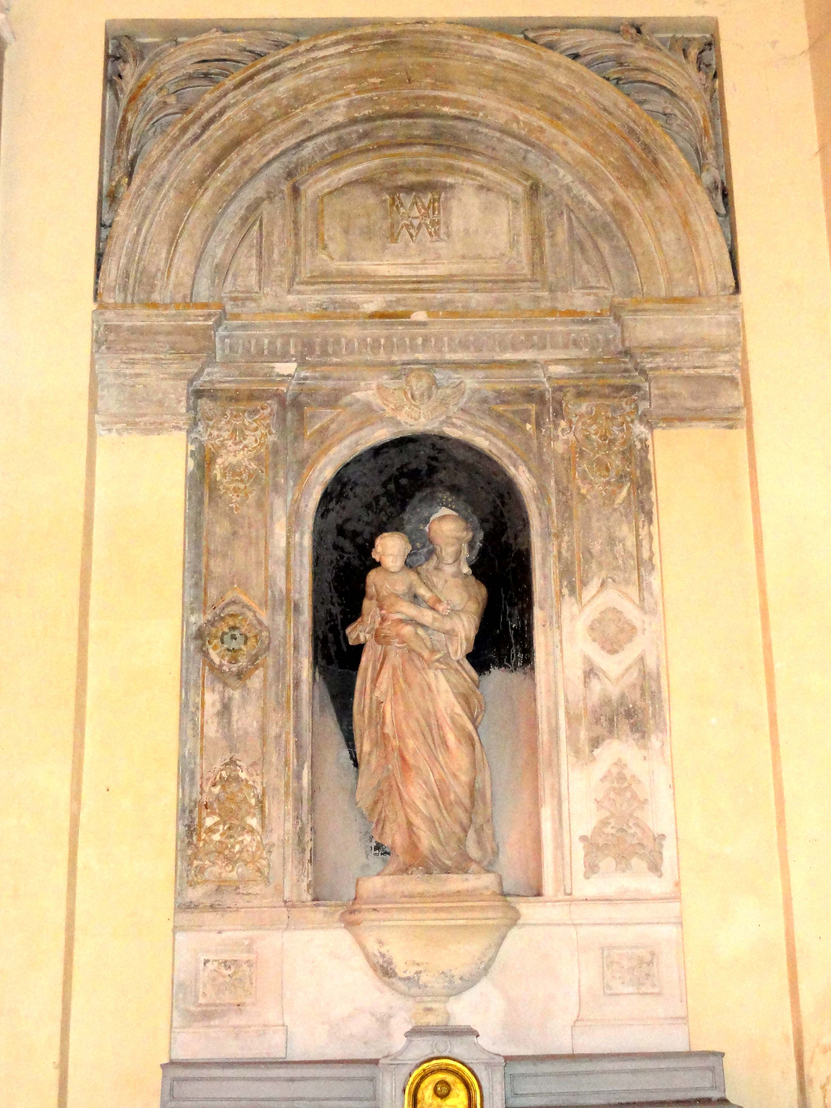 Mobilier de l'église - voir titre.